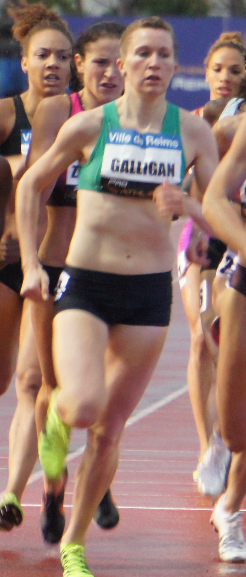 800 mètres féminin lors des Rencontres d'athlétisme de Reims 2013: Roseanne Galligan.